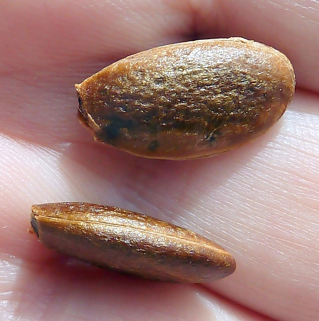 Diospyros kaki cv. Persimon (Caqui Persimon) : Simientes sueltas - Comercio, Madrid (España); procedencia desconocida.